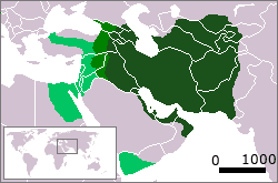 Carte des conquêtes sassanides par Khosro II entre 602 et 622